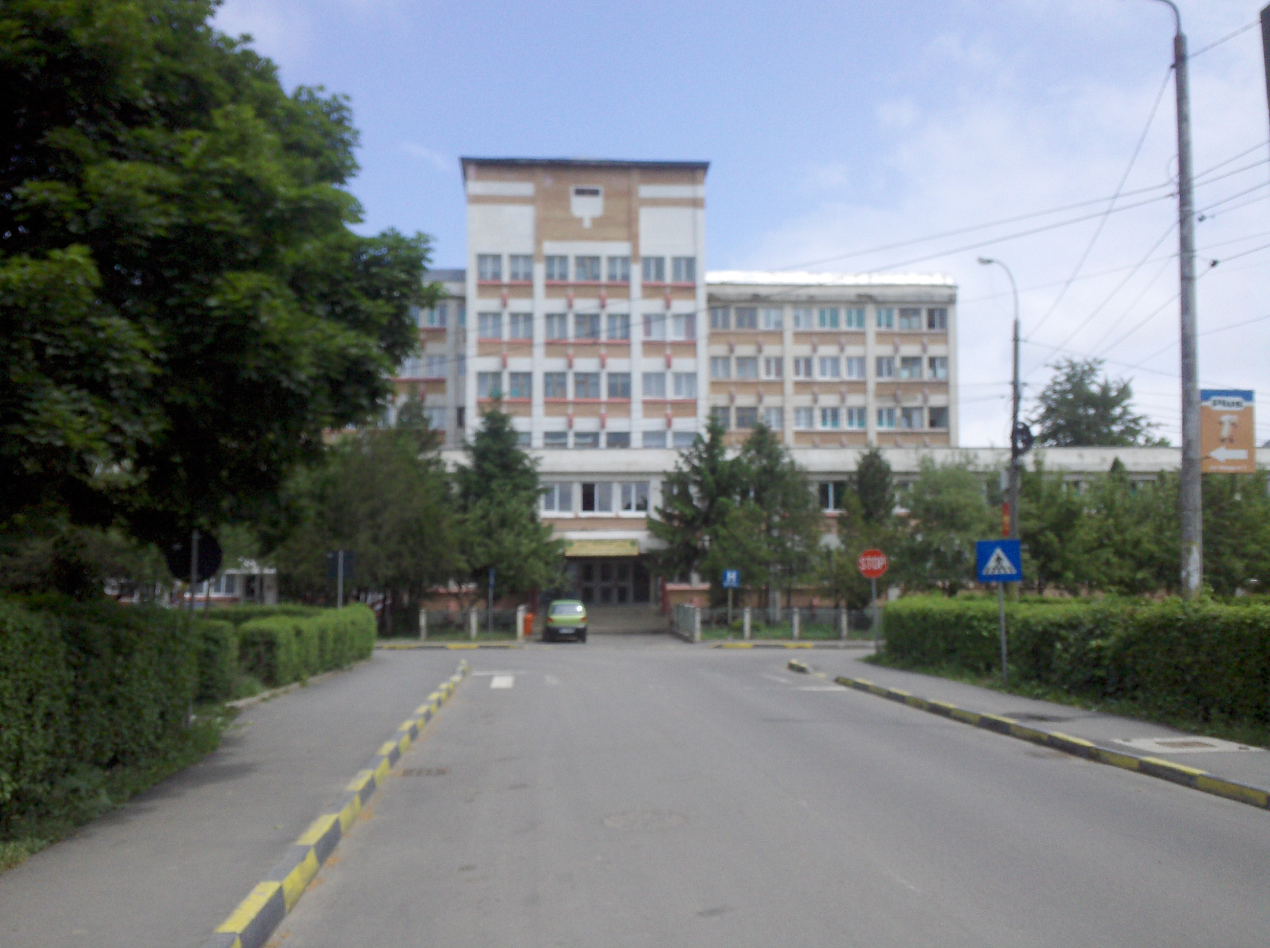 Hospital en la ciudad rumana de Buhuşi